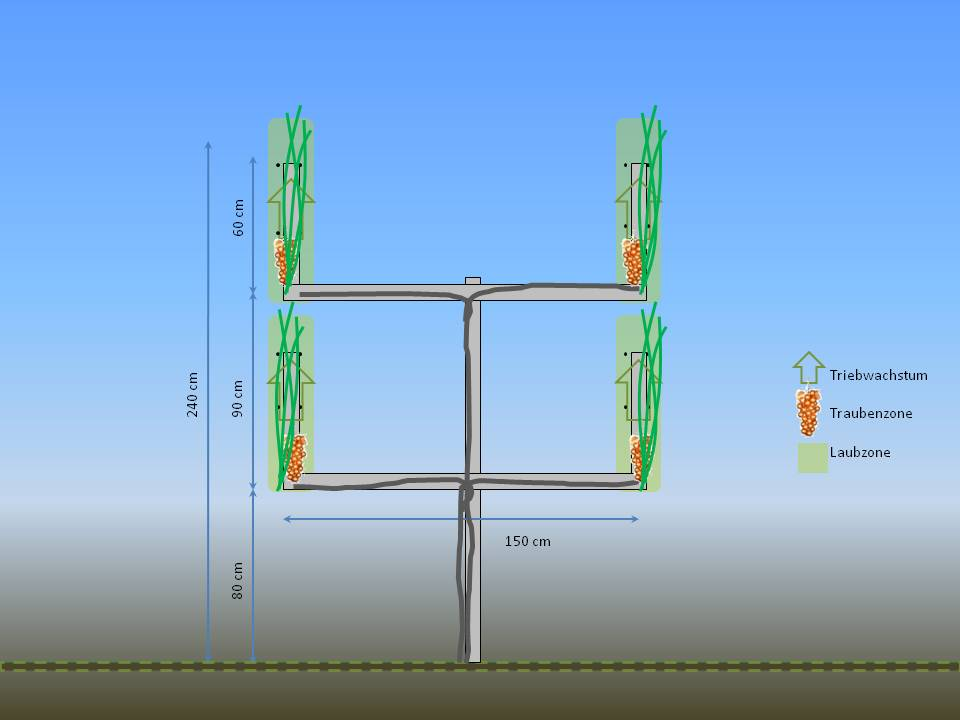 Ruakura Erziehung RT2TA